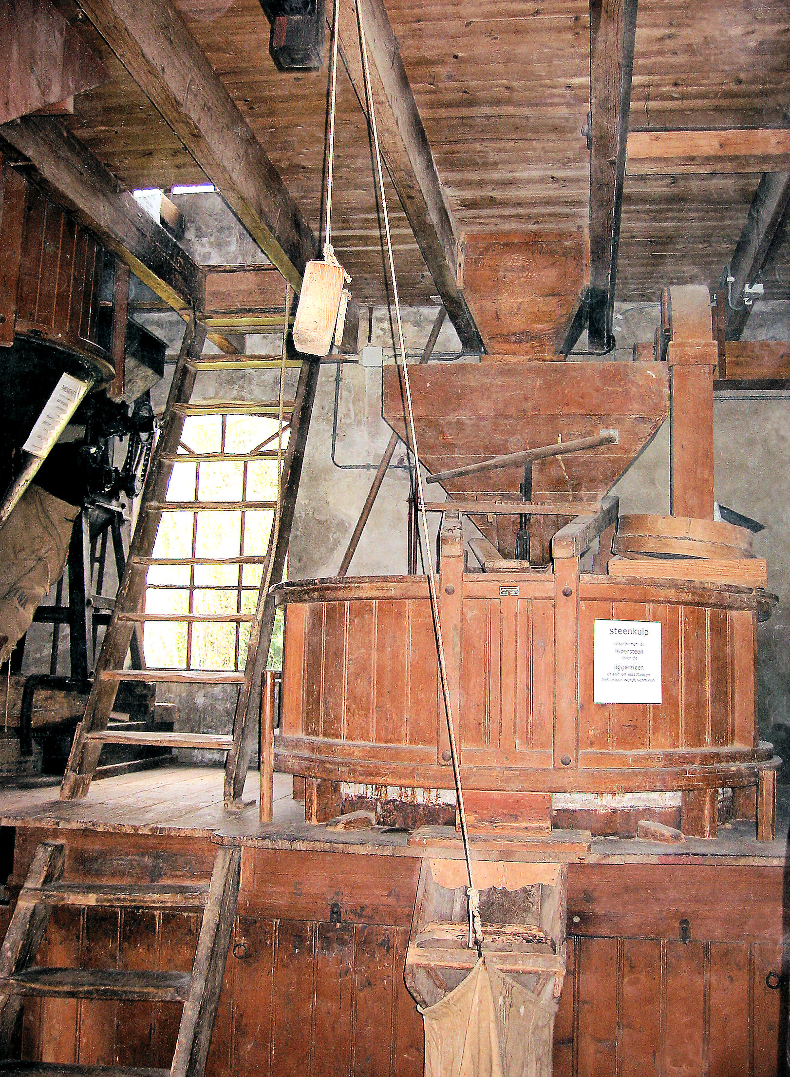 Maalstoel van de Molen De Nieuwe Molen in Sinderen, the Netherlands